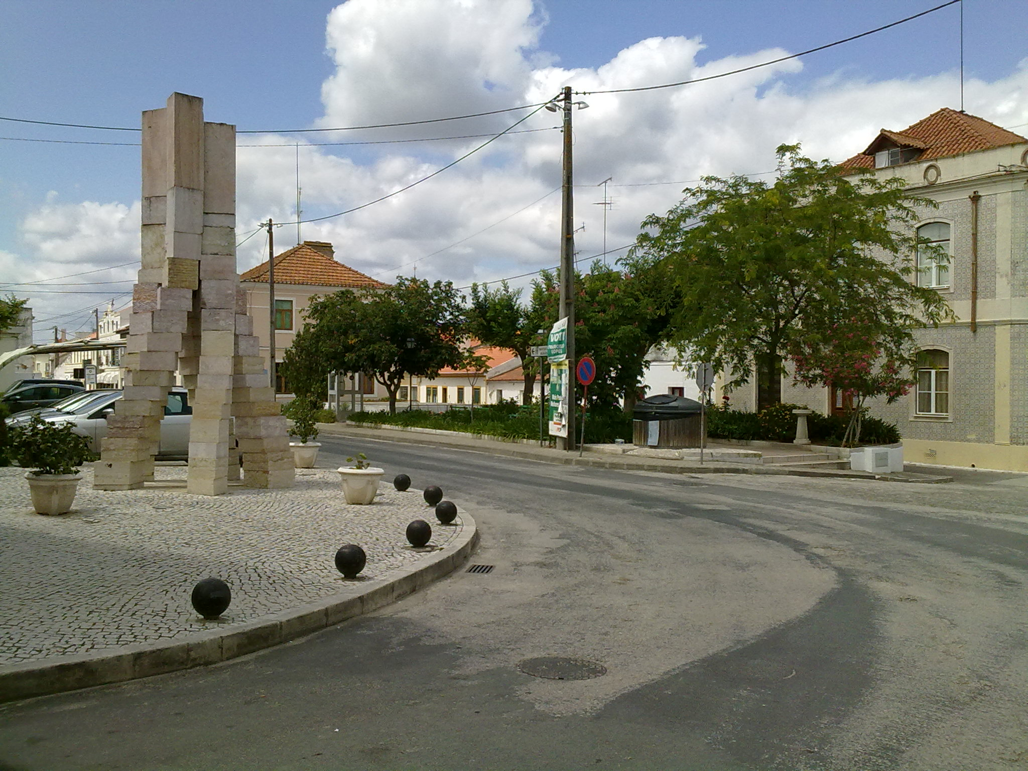 Couço (Praça da República), Portugal.